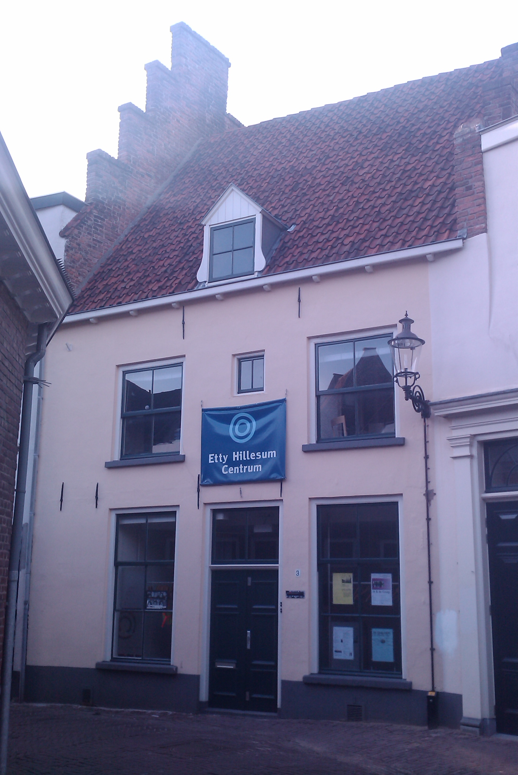 Rijksmonument, Deventer, Nederland (The Netherlands)